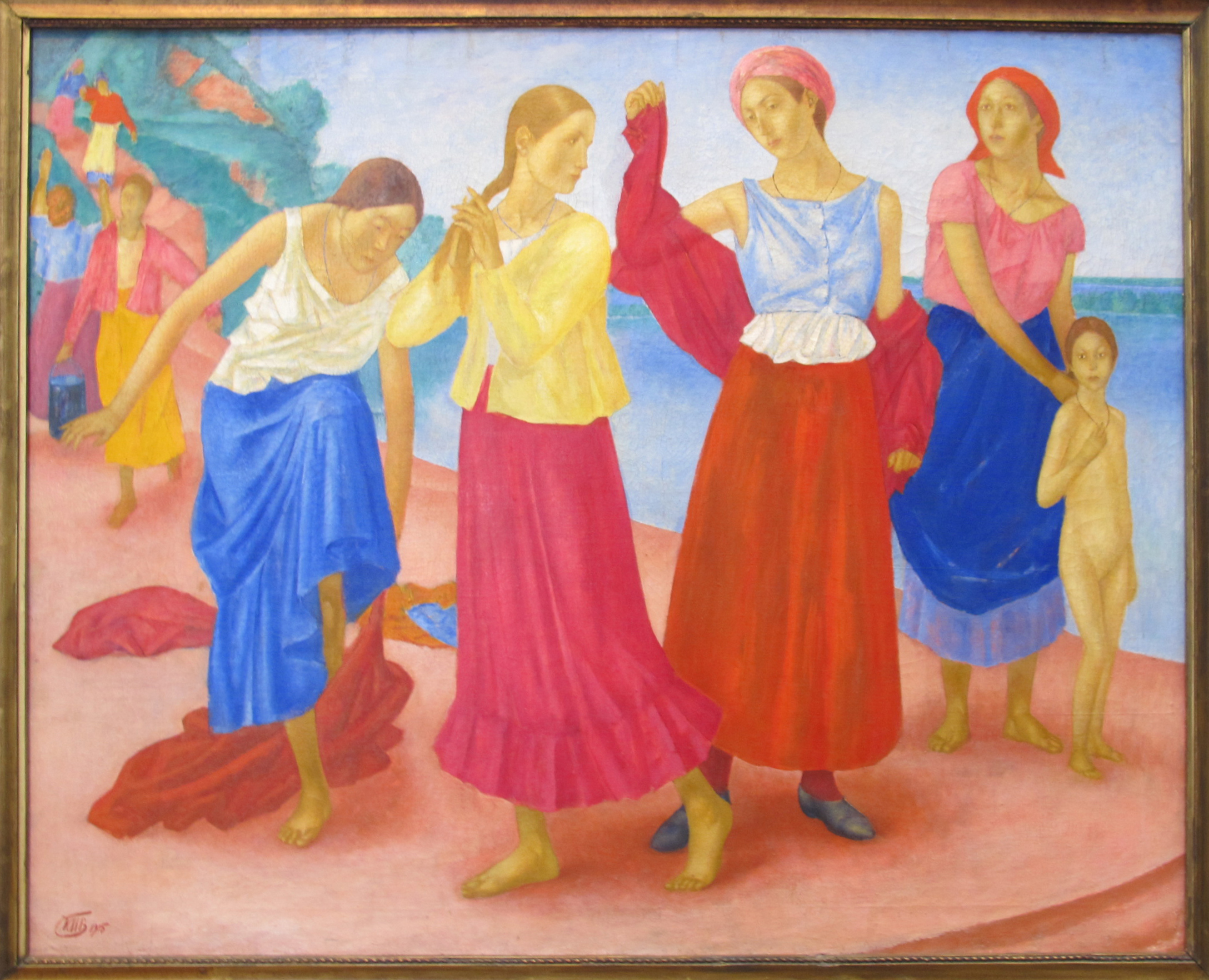 Kuzma petrov-vodkin, ragazze sul volga, 1915